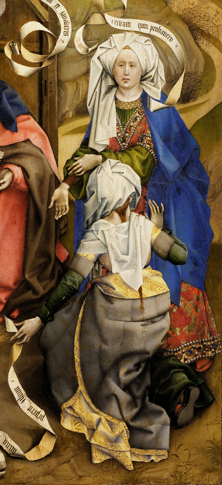 detail